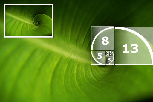 Folha de bromélia, na qual o esperial é formado por quadadros nas quais as arestas são proporcionais á sequência de Fibonacci: 1,1,2,3,5,13...